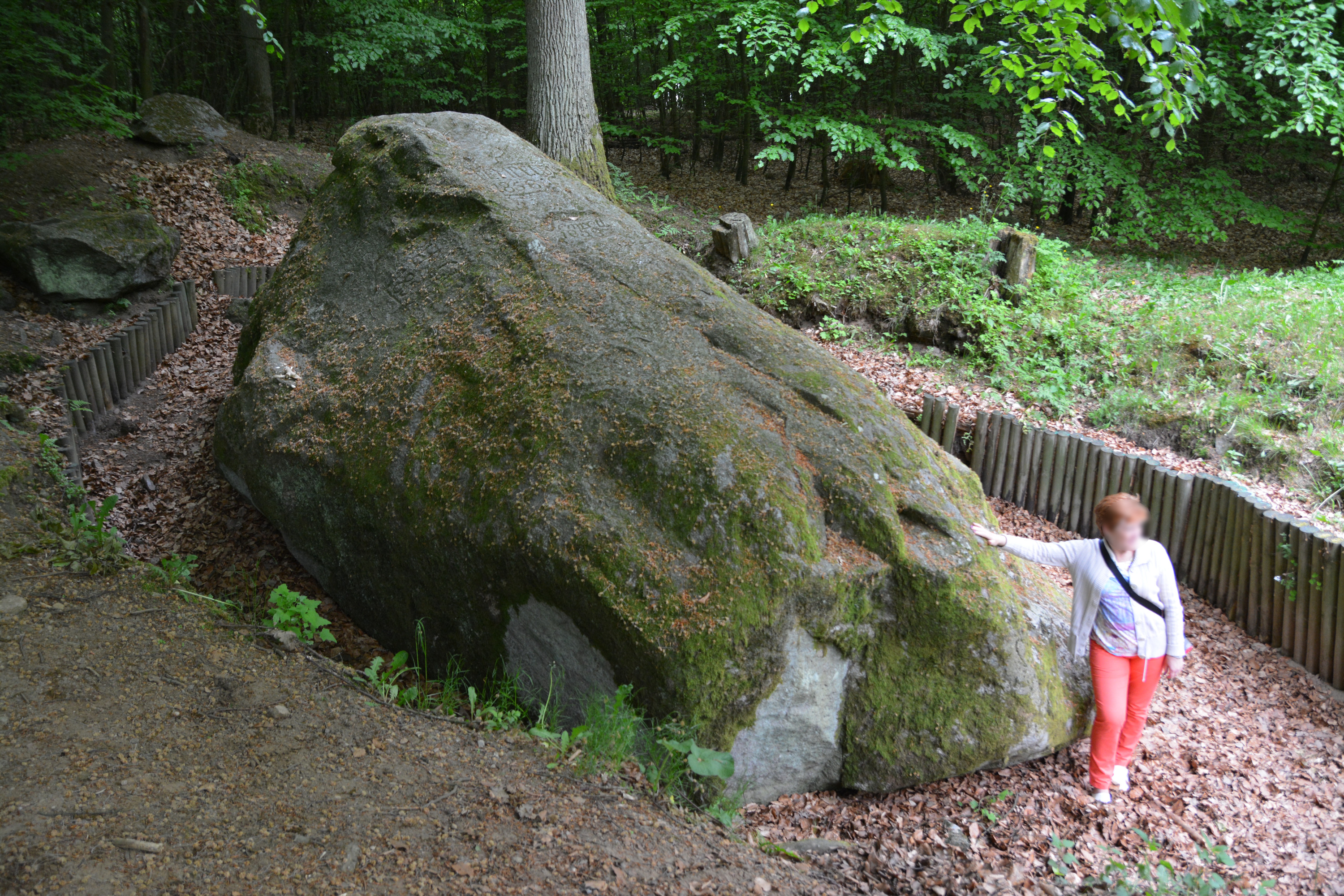 Głaz Tempelburg koło Czaplinka